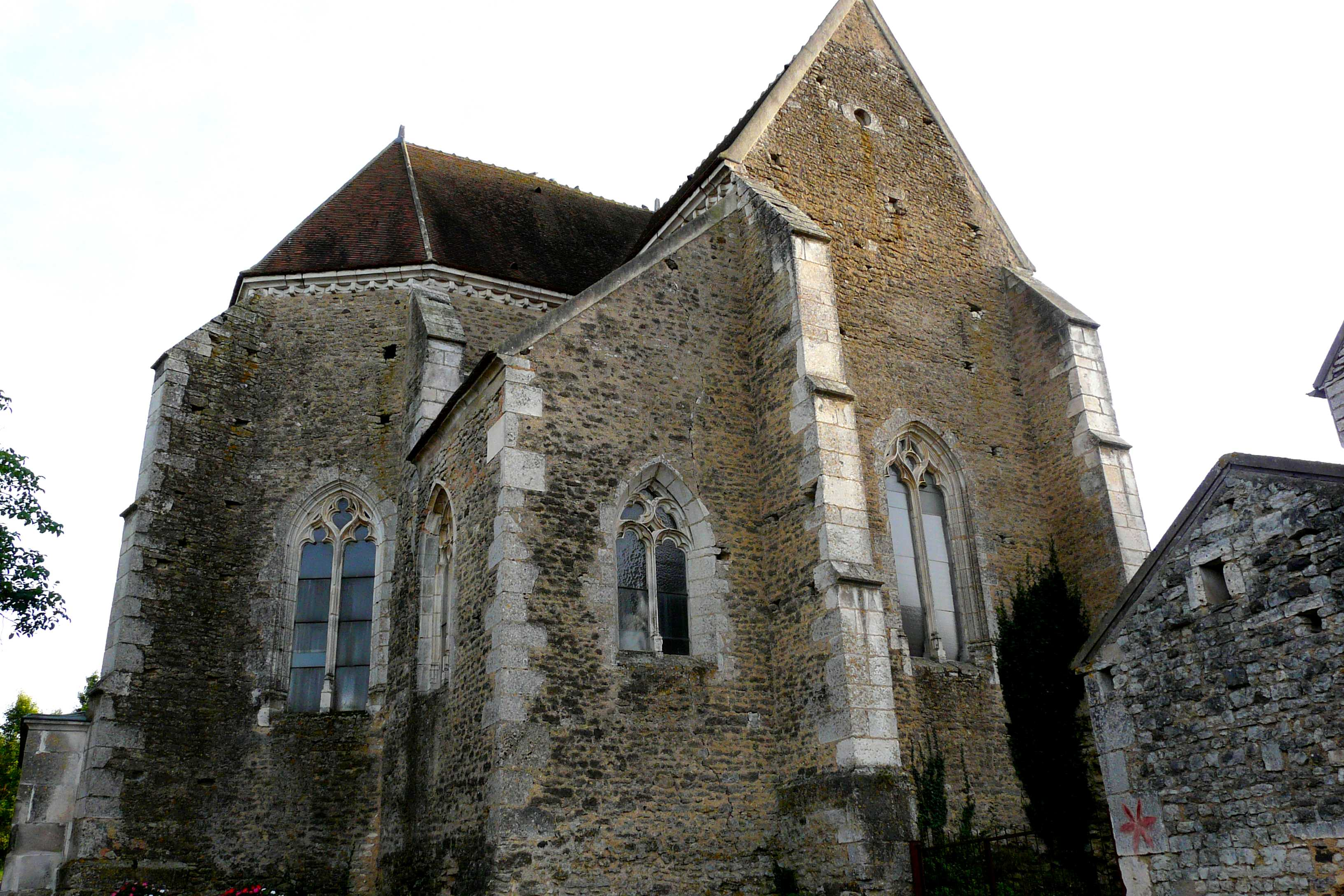 Église de Collan (Classé) .